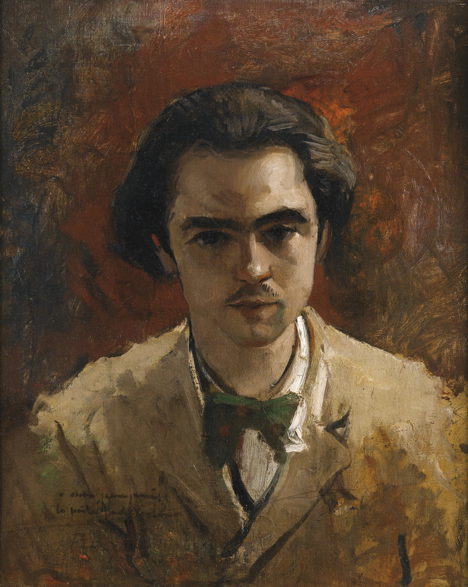 Frédéric Bazille, Bildnis des Paul Verlaine, Bild, Zürich, Galerie Chichio Haller